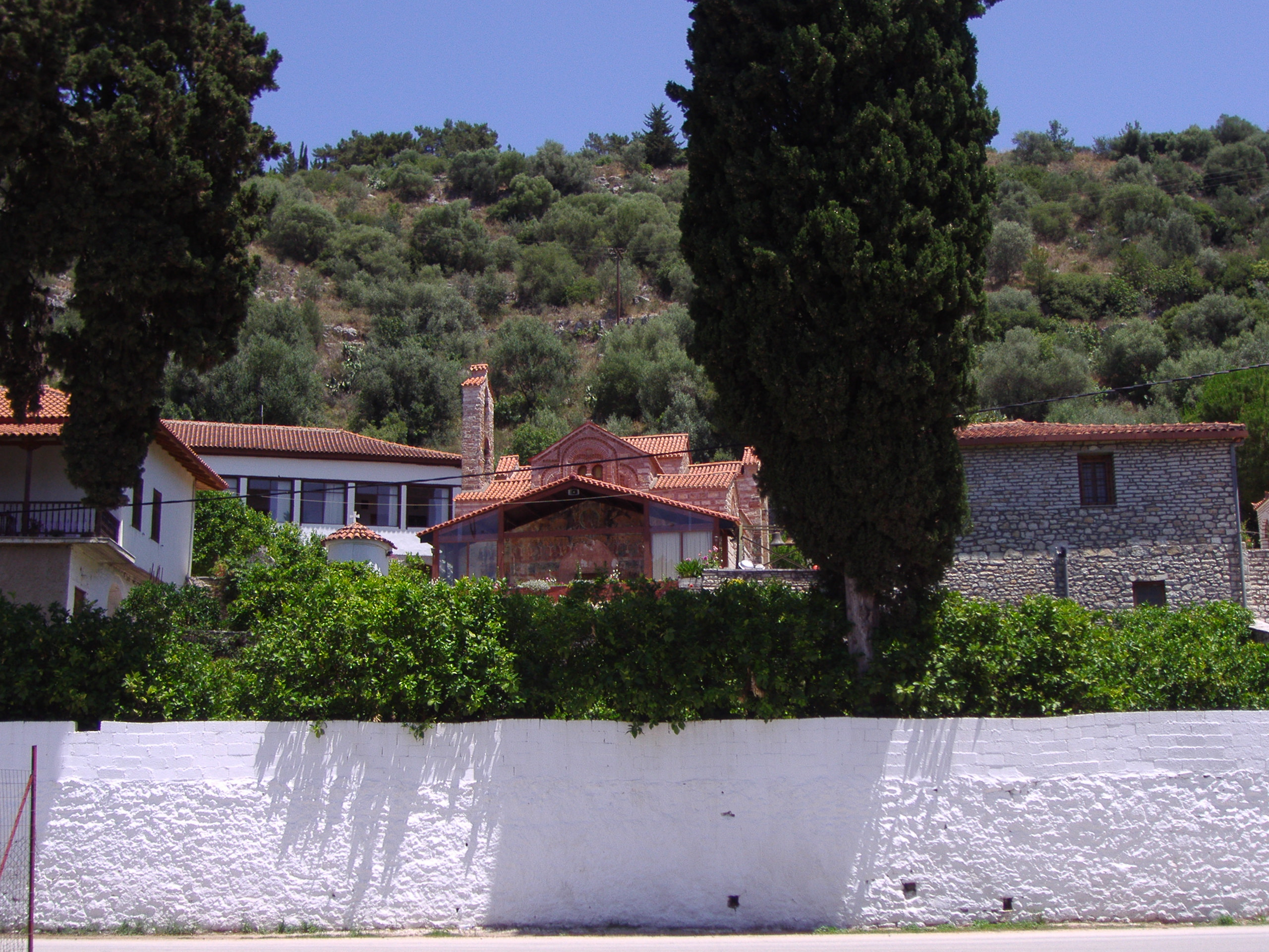 I.M.PANAGIAS